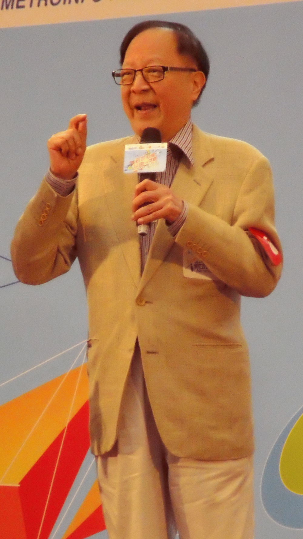 中文（香港）: 鍾景輝的樣子